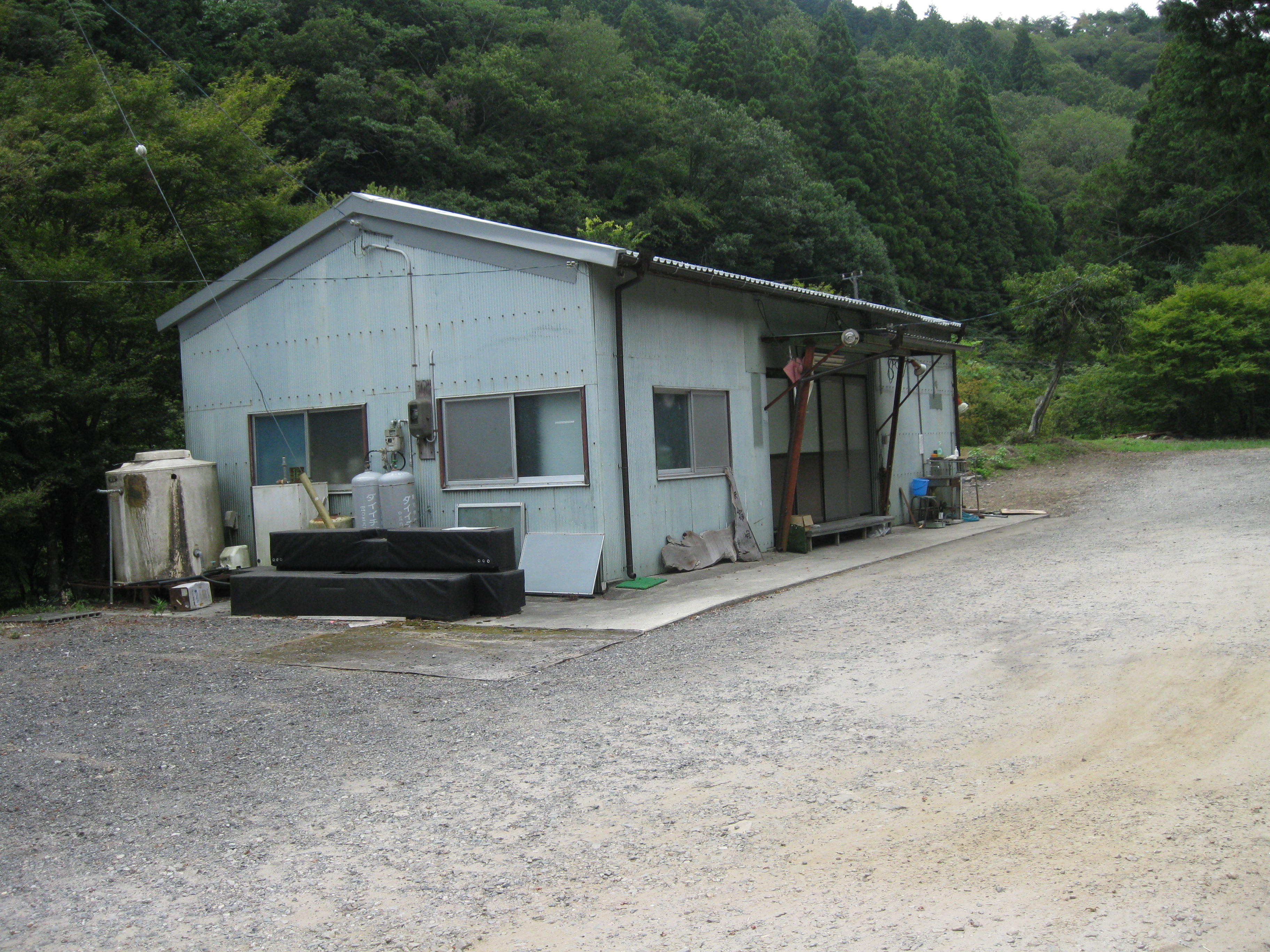 岡崎市日近太鼓